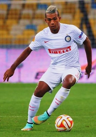 Juan Jesus during Inter vs Metalist Kharkiv match (UEFA Europa League), september 2014.